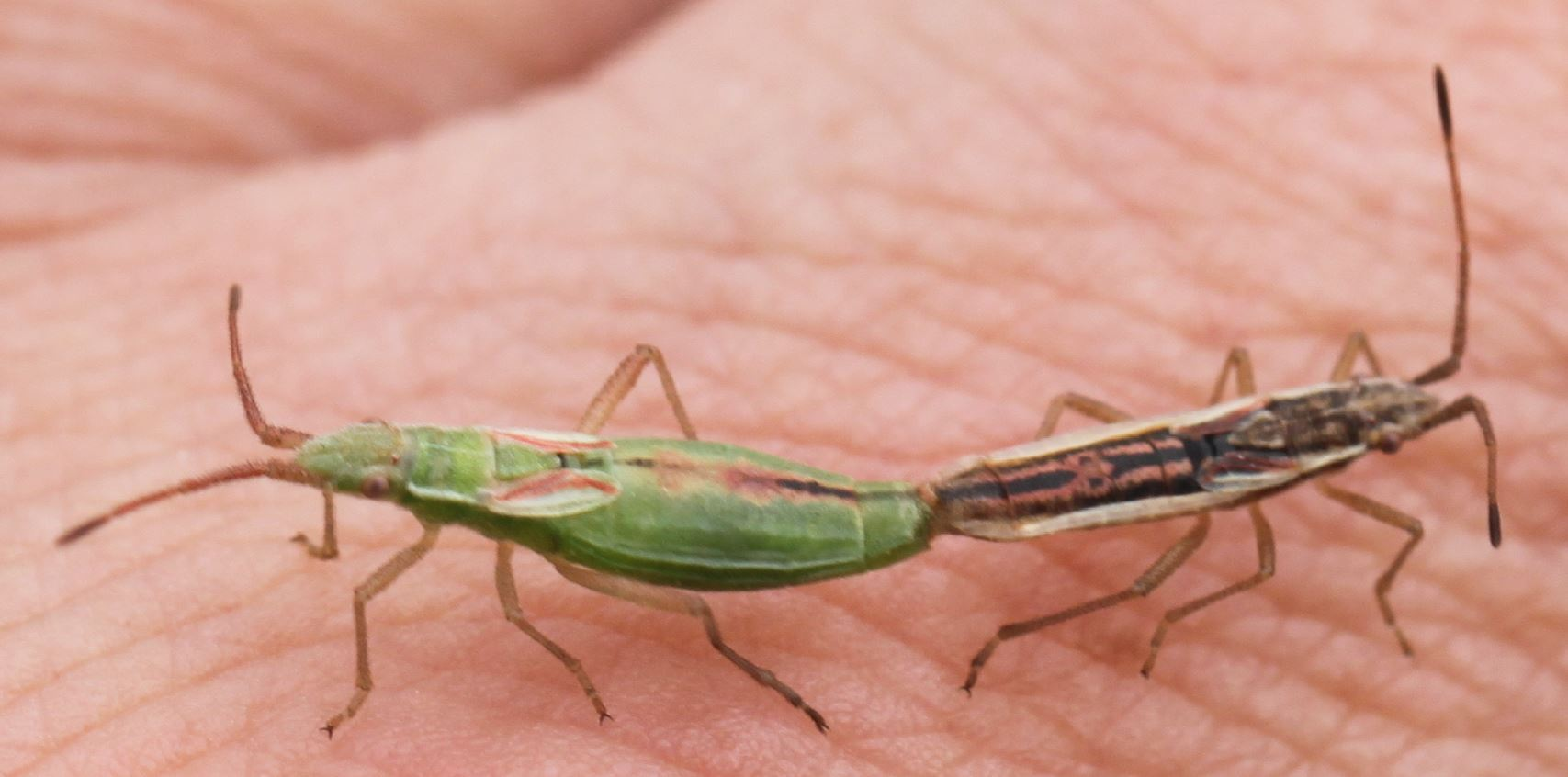 Wanzen der Art Myrmus miriformis bei der Paarung; braune Form des Männchens; am 3. September 2018 in Walldorf/Baden